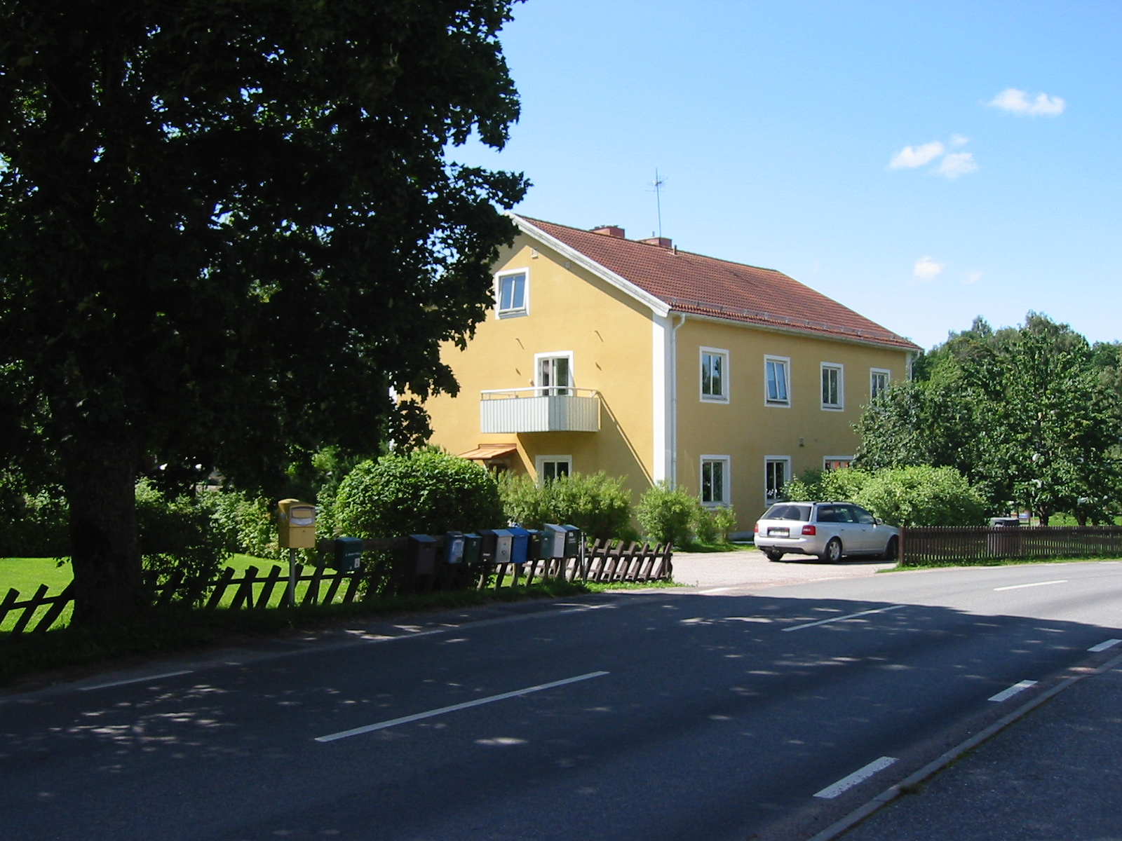 De centrala brevlådorna i Herrskogen strax väster om Strömsholm, Hallstahammars kommun.